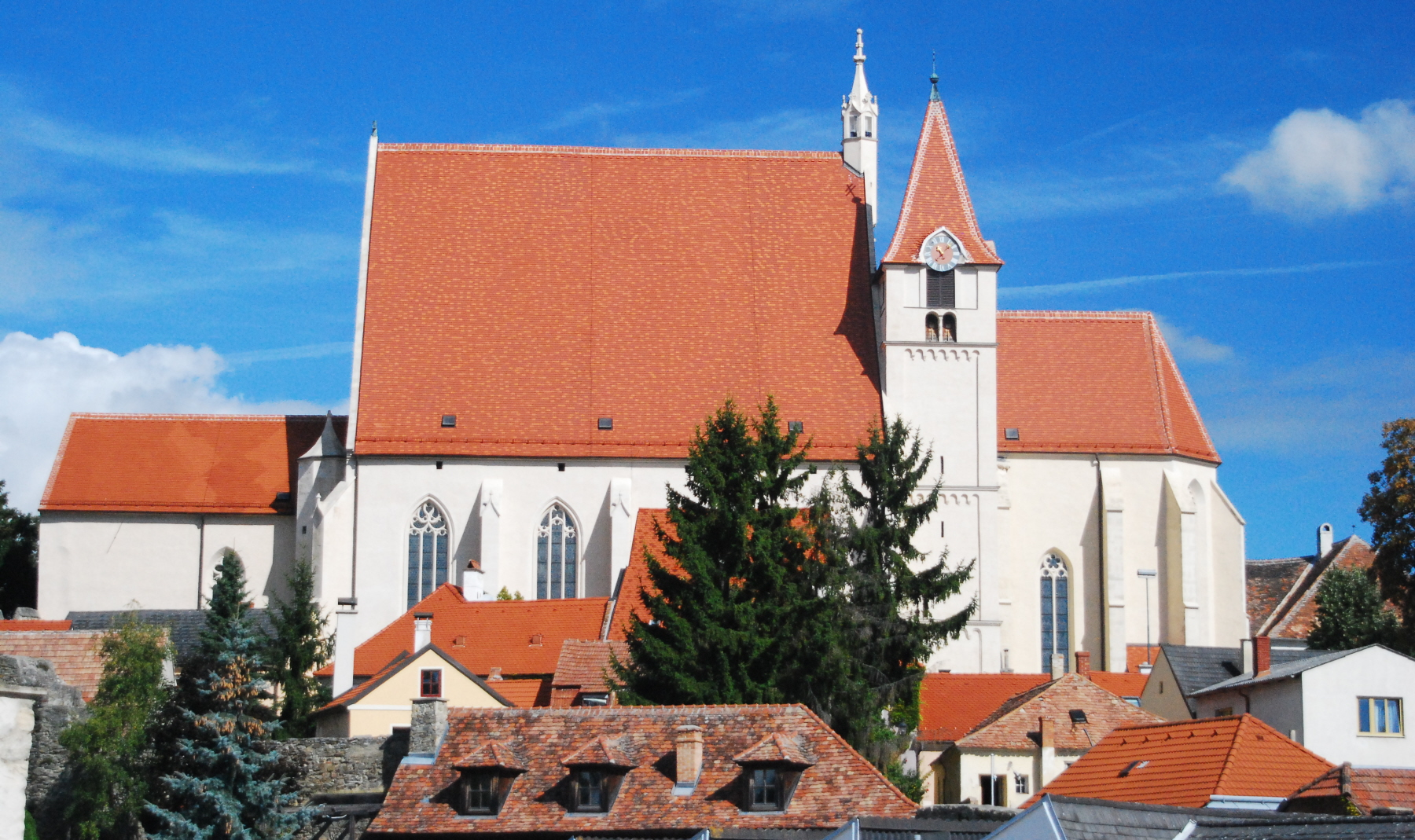 Kath. Pfarrkirche hl. Stephanus